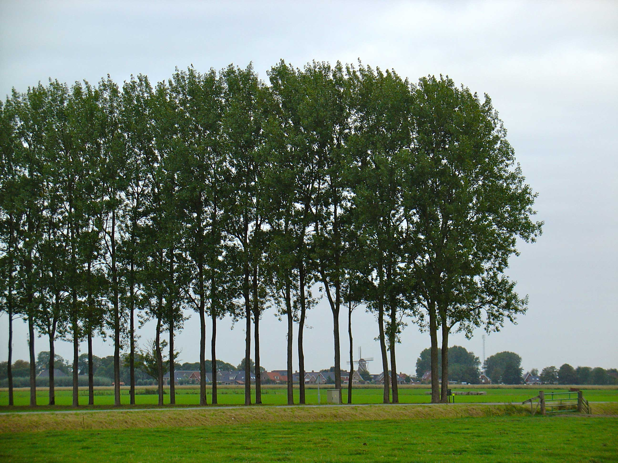 Zicht op Thesinge met molen Germania (gemeente Ten Boer)